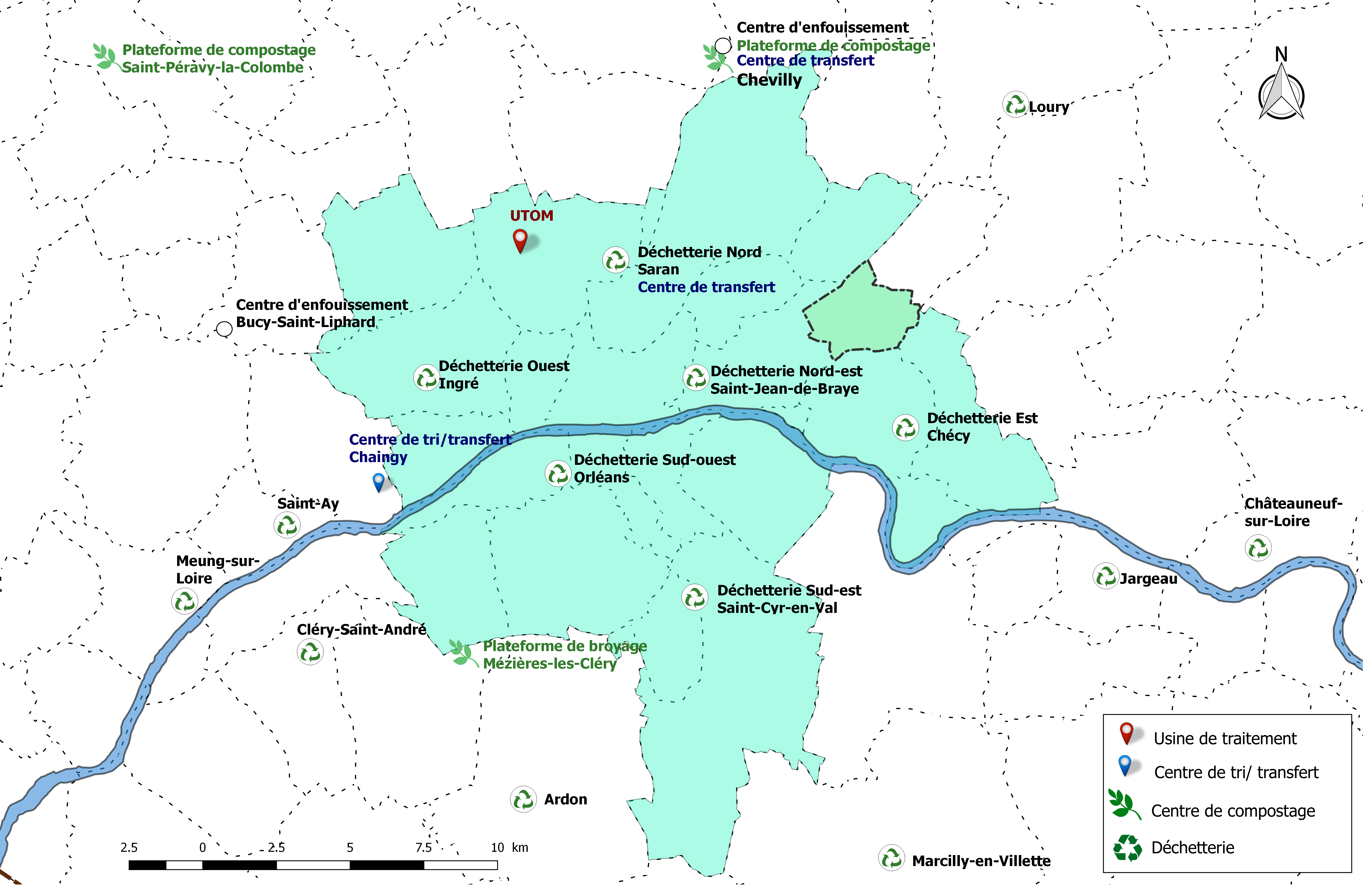 Site de collecte, de traitement et de valorisation des déchets de la communauté urbaine d'Orléans Métropole, avec localisation de la commune de Boigny-sur-Bionne